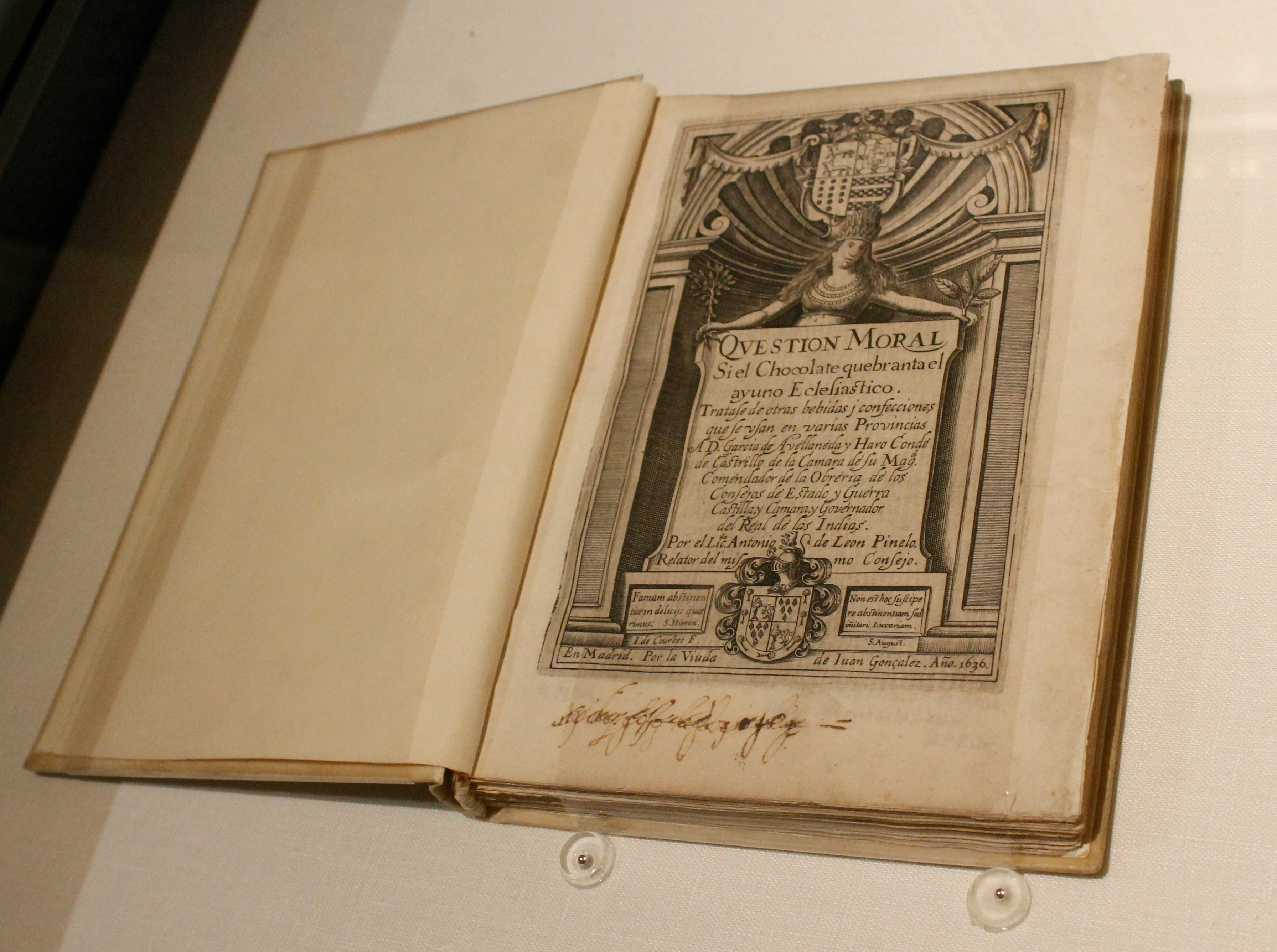 Obra expuesta en Museo Soumaya, Plaza Loreto